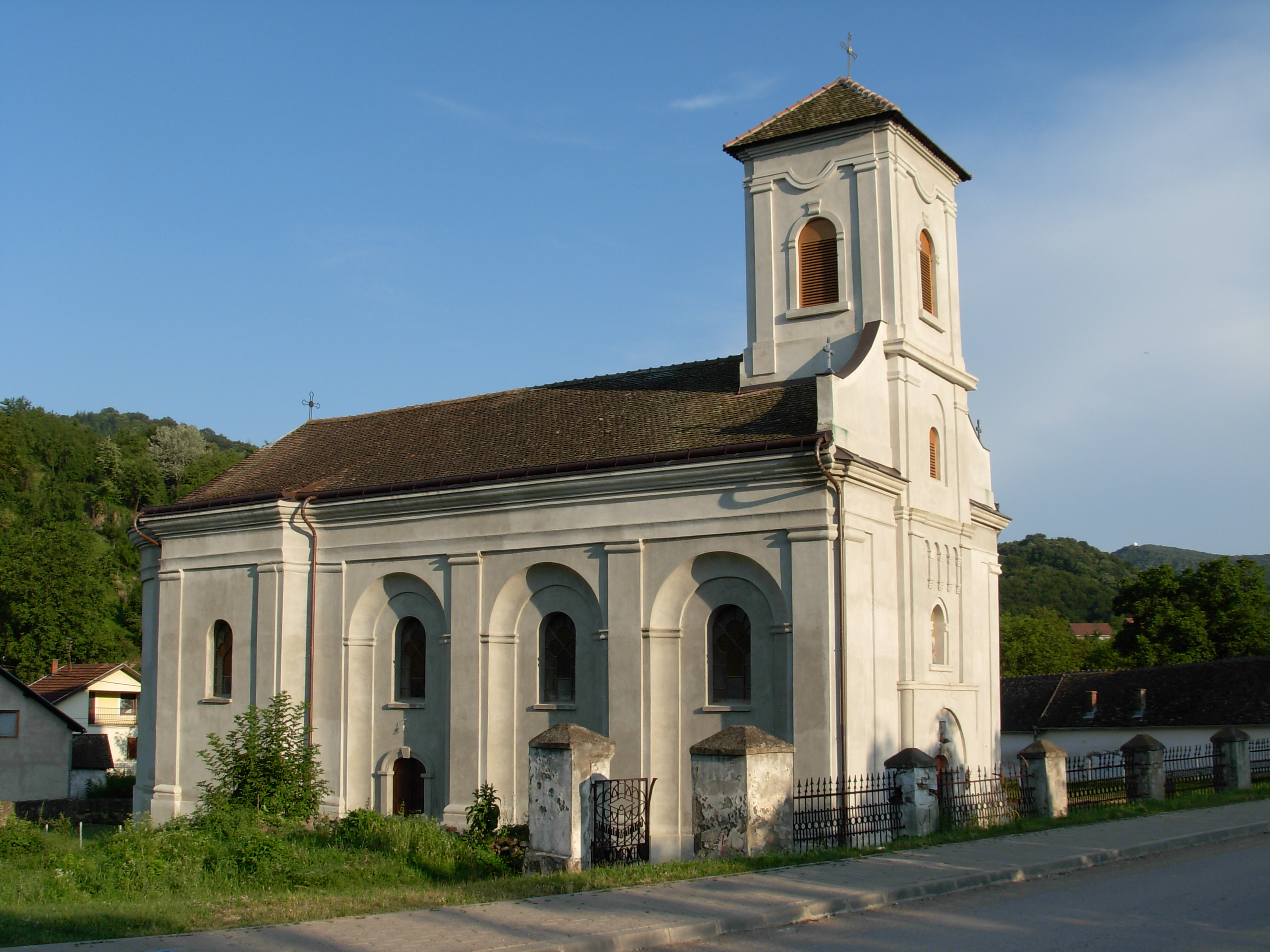 Crkva svetog Nikolaja u Starim Ledincima.